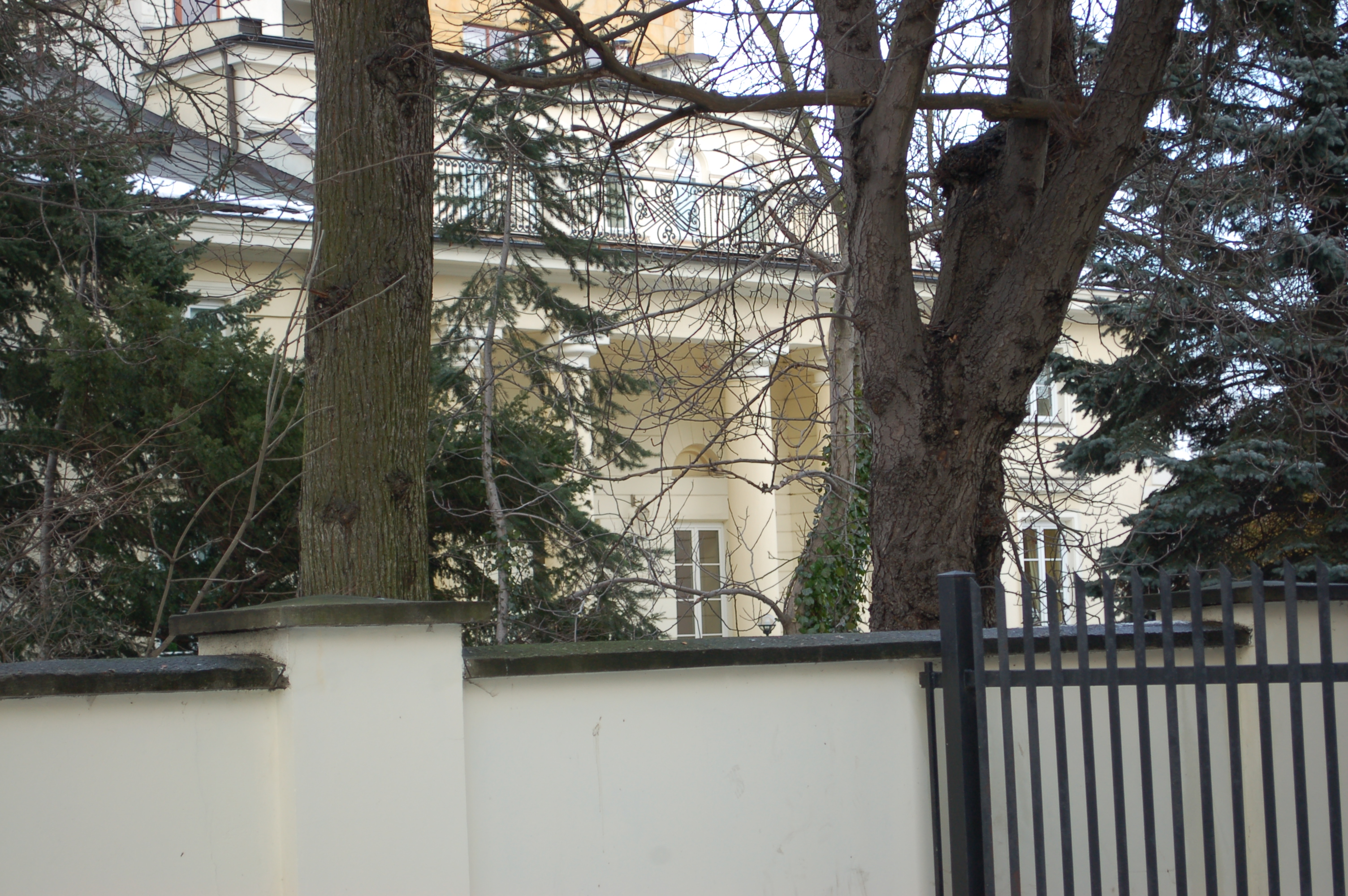 Henryk-Palast, Warschau